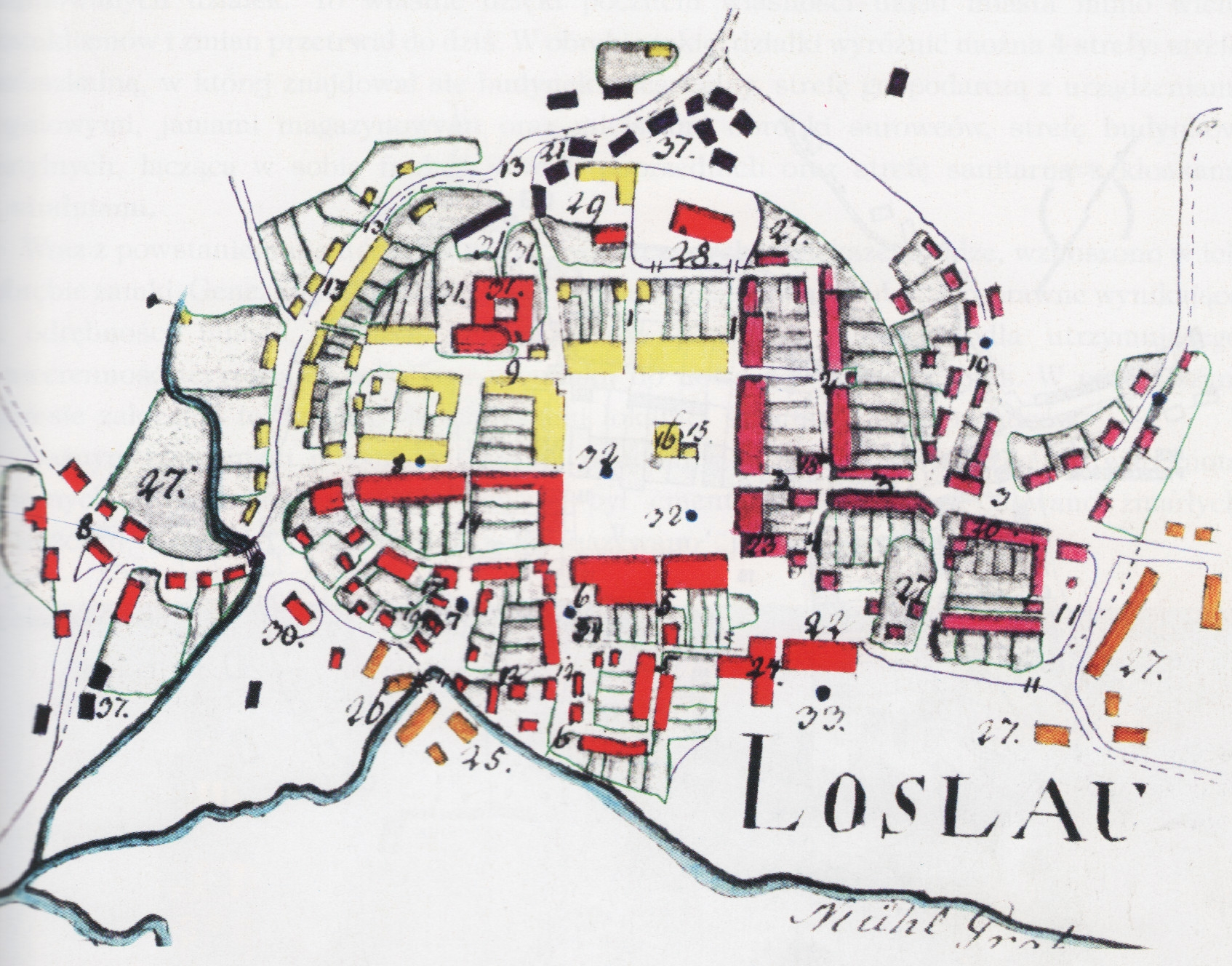 Plan Wodzisławia Śl. wg V Jurziczki z XIX w.